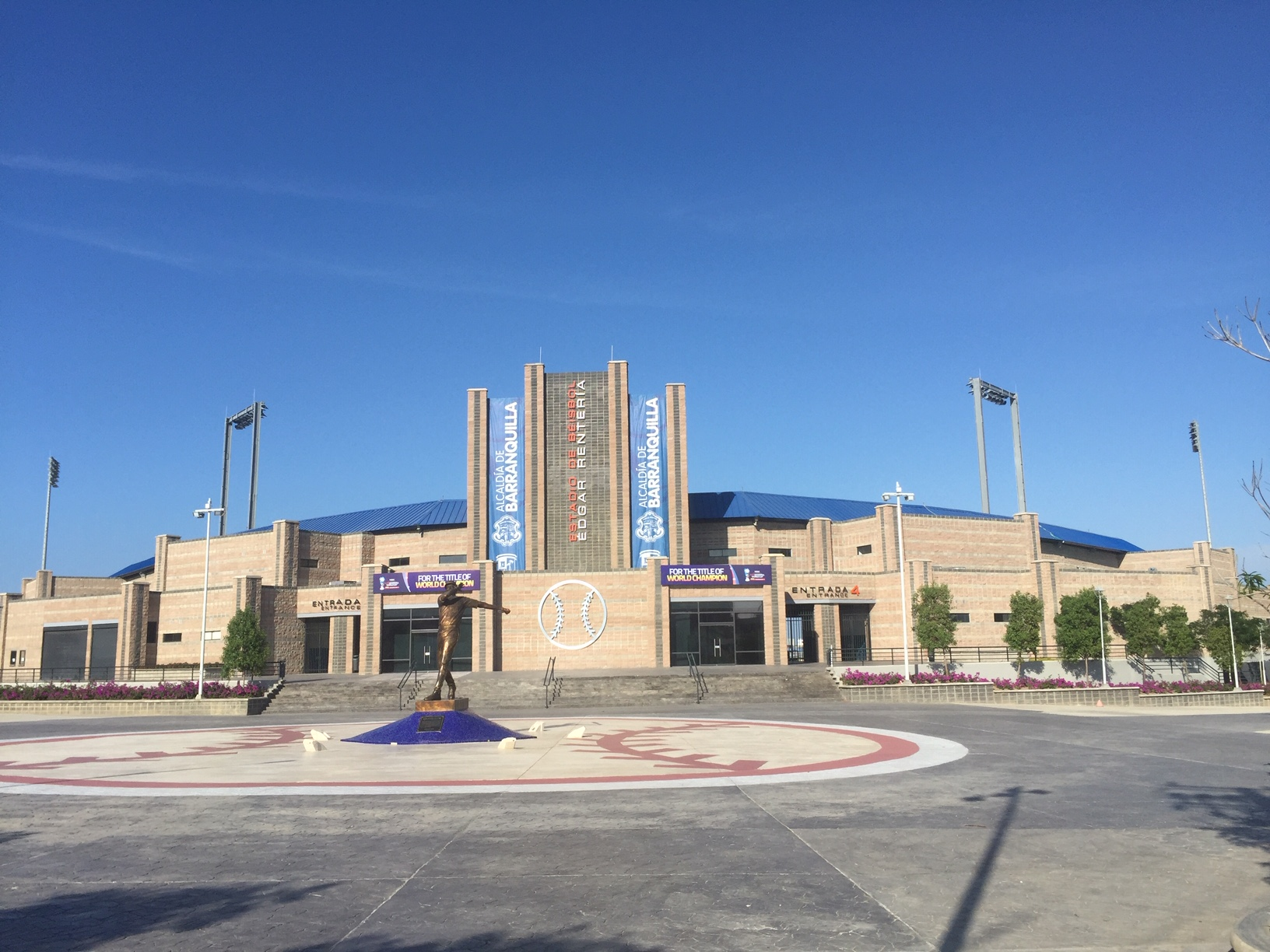 Fachada Estadio Edgar Renteria